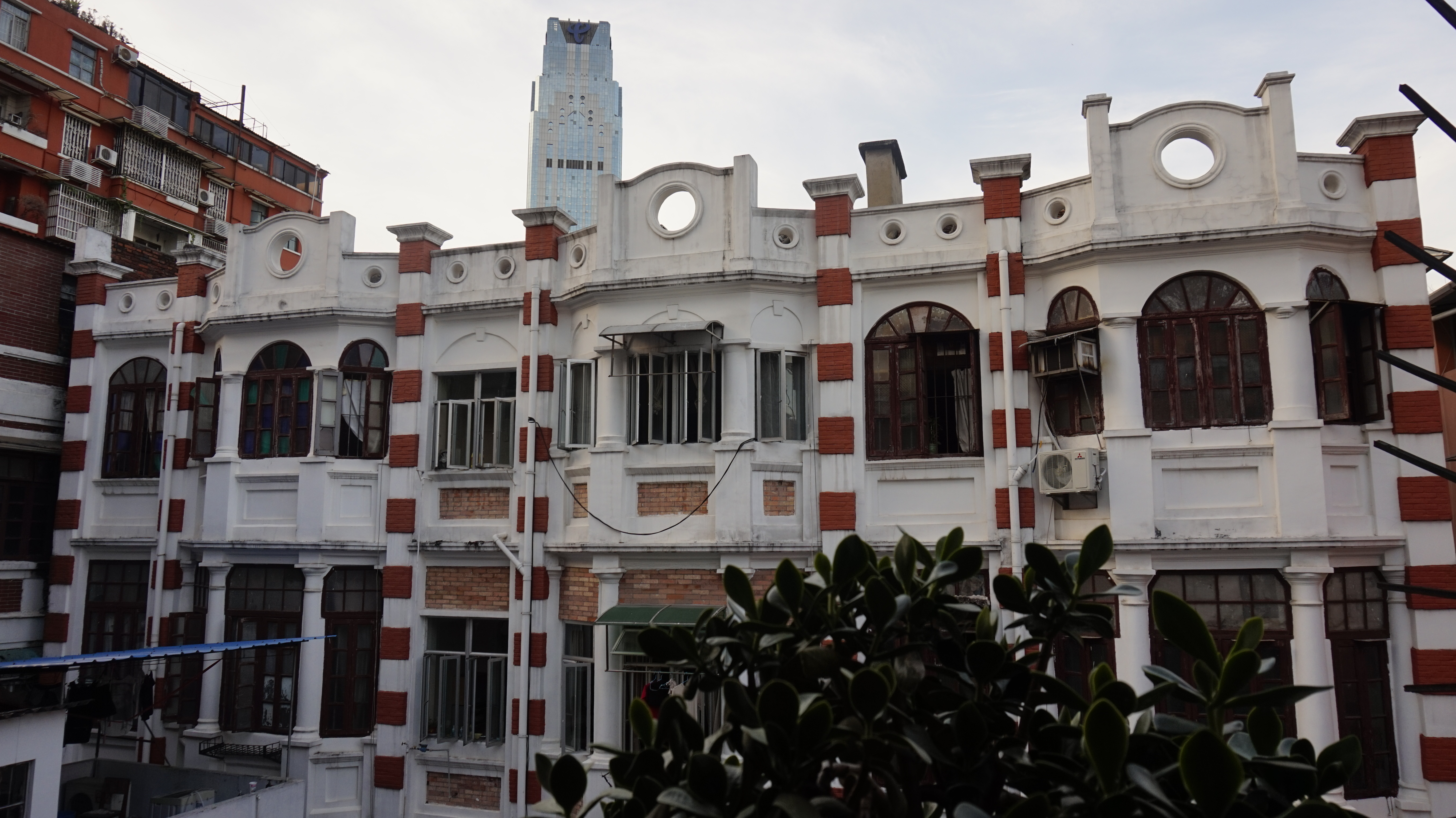 中文（中国大陆）: 位于广东省广州市越秀区龟岗三马路16、18、20号。